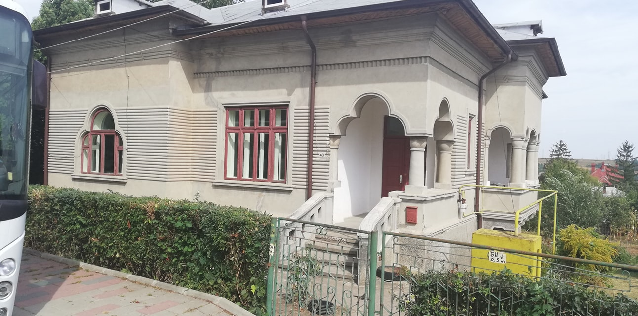 Casa Ciopec este un monument de arhitectură locală din Municipiul Dorohoi, situat pe strada ”Alexandru Ioan Cuza”, la nr. 48 Casa datează dinsecolul XX, mai precis din anul 1939, și dă o notă aparte străzii pe care se află, reușind prin arhitectura sa să aducă în prezent puțin din farmecul perioadei interbelice.